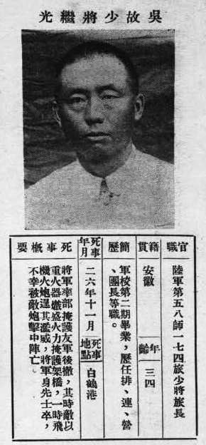 中文（台灣）: 抗戰軍人忠烈錄第一輯中的烈士遺像